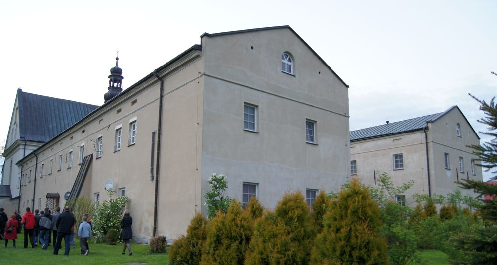 Zakliczyn - zespół klasztorny reformatów, poł. XVII, XIX: klasztor, XVII, 2 poł. XIX